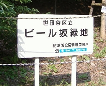 ビール坂斜面が緑地として世田谷区によって保護されている。